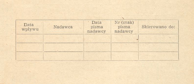 System kancelaryjny mieszany. Książka wływu /Dziennik podawczy/.